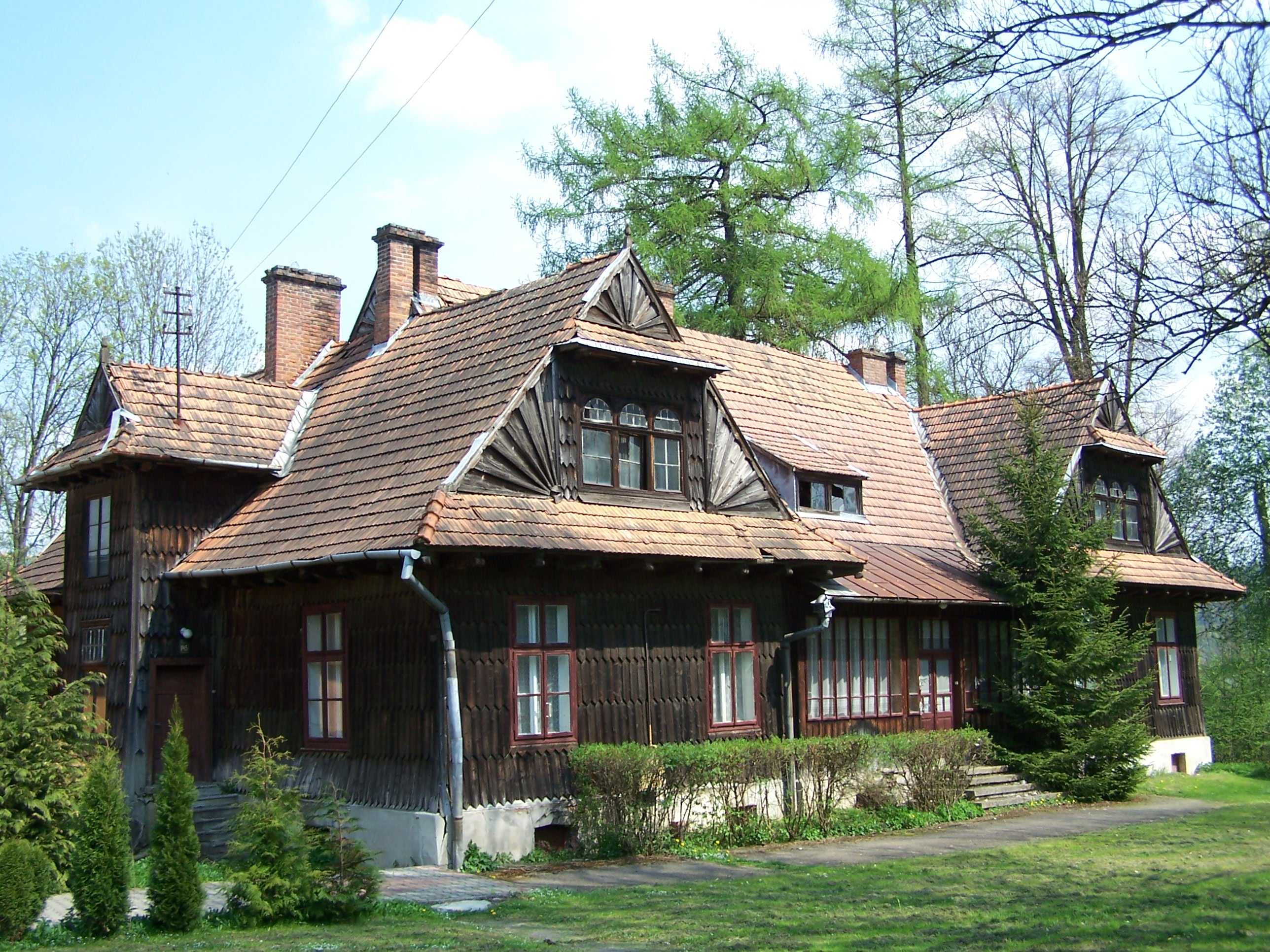 Plebania w Dydni